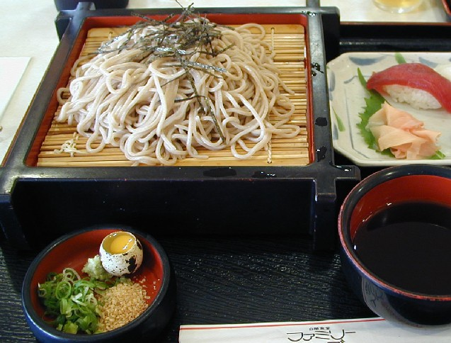 Soba